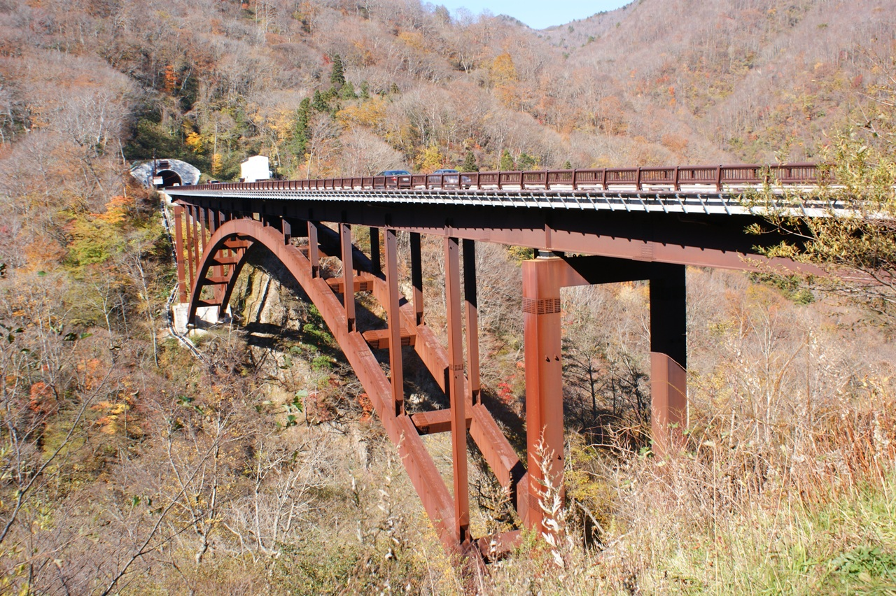 甲子道路（国道289号）にある甲子大橋